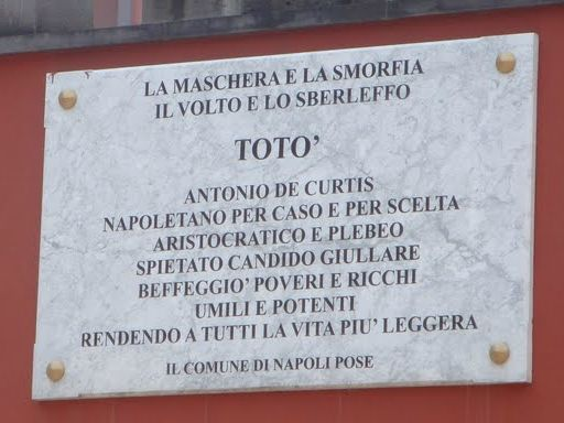 Targa commemorativa dedicata a Totò. In Piazza Cavour a Napoli